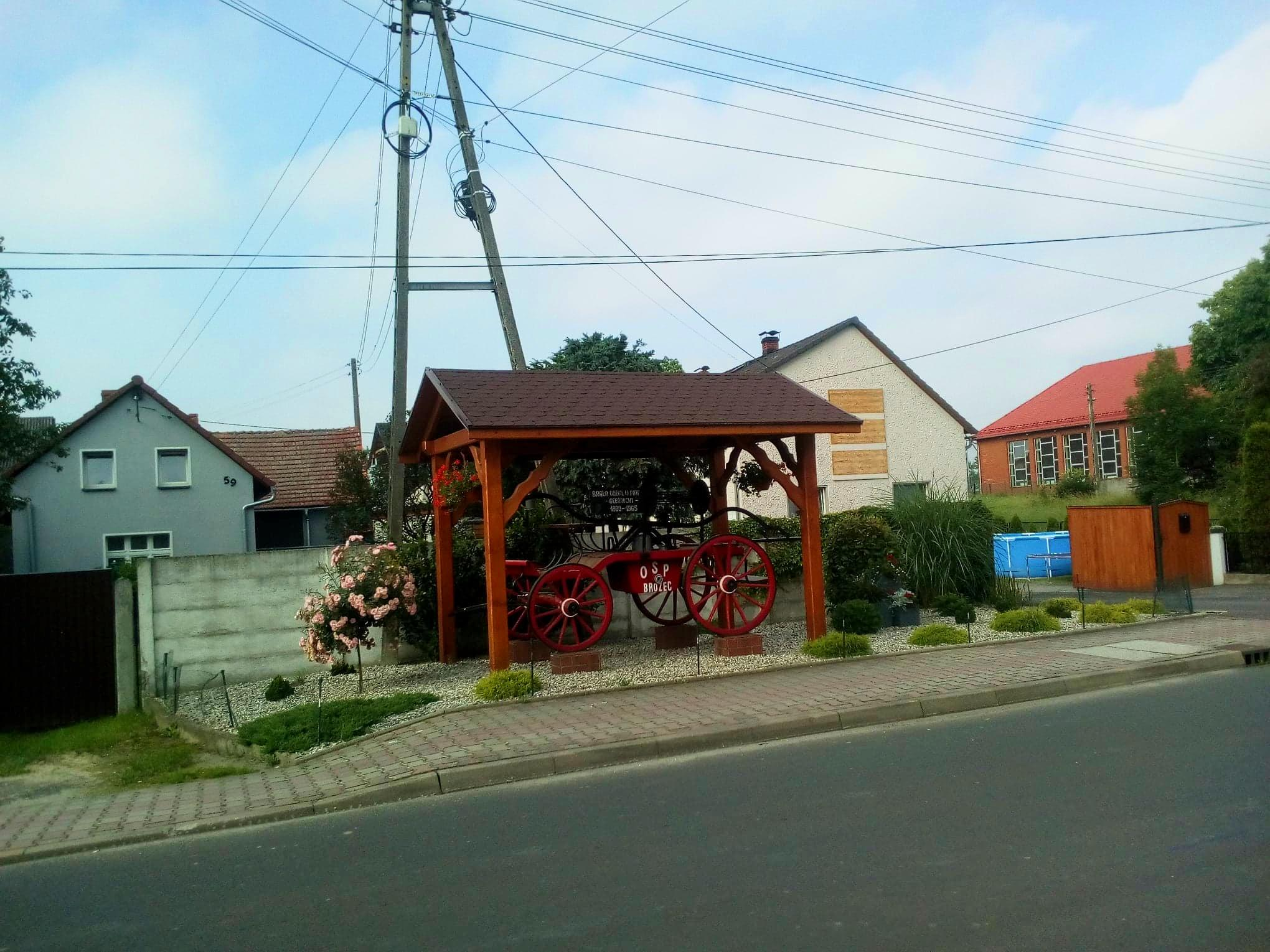 Brożec - Zabytkowy wóz strażacki